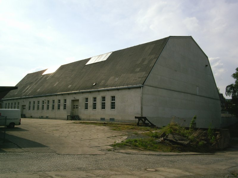 Außenaufnahme der Wilthener Halle (1. Drittel der alten Dresdner Militärluftschiffhalle, heute Lager der Hardenberg-Wilthen AG)